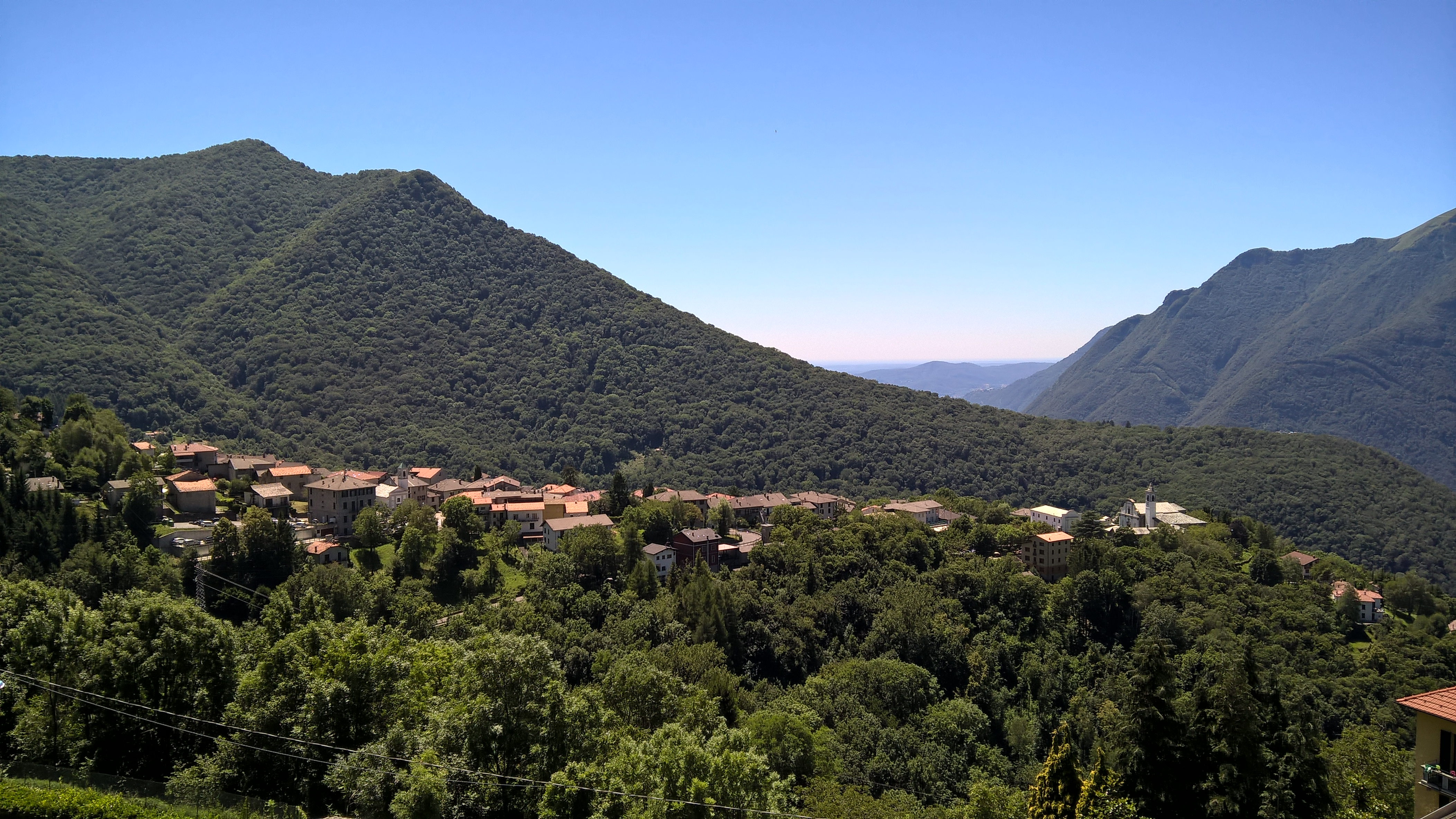 Veduta del paese di Zelbio dal vicino comune di Veleso